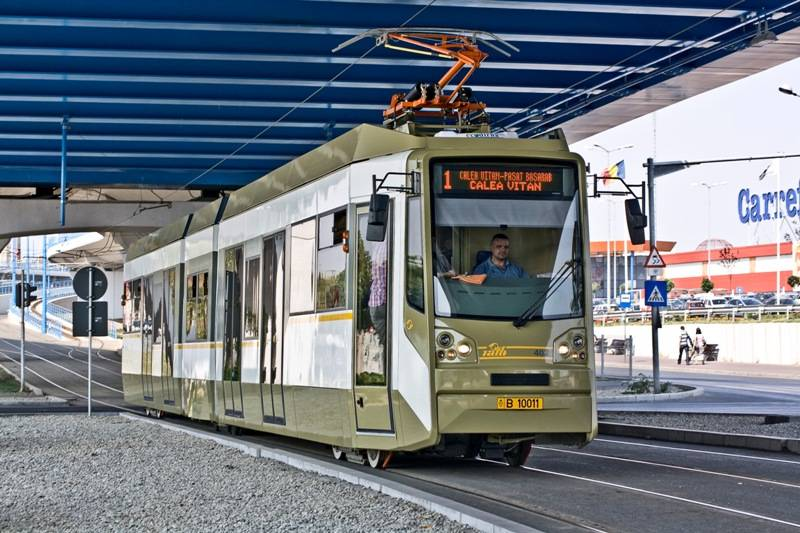 Bucur LF